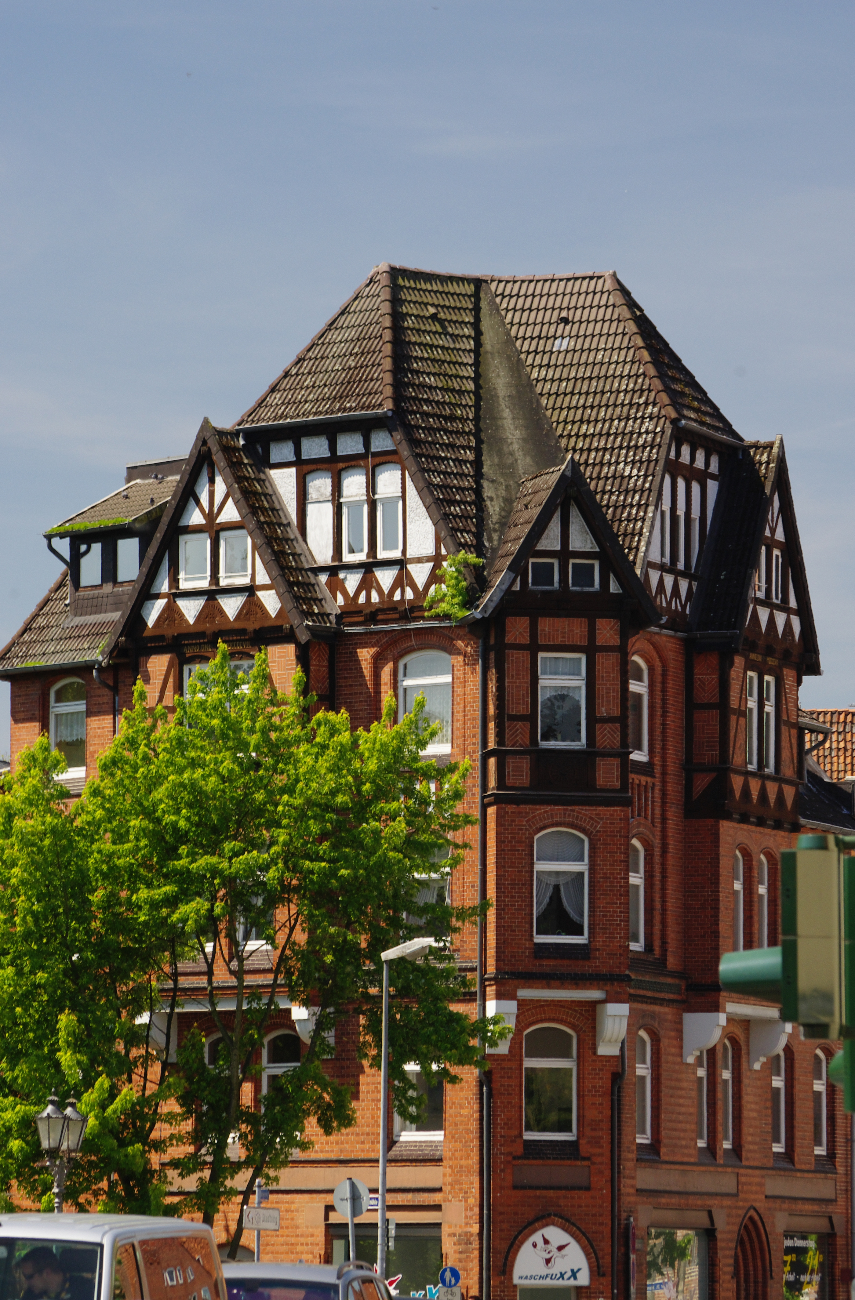 Lüneburg, Skillshare 2010, Stadtrundgang, Haus Altenbrückertorstraße 5/6 (erbaut 1907; Architekt: Hermann Matthies)